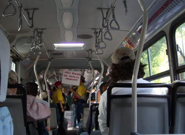 Vista del interior del metrobús de la Ciudad de México.